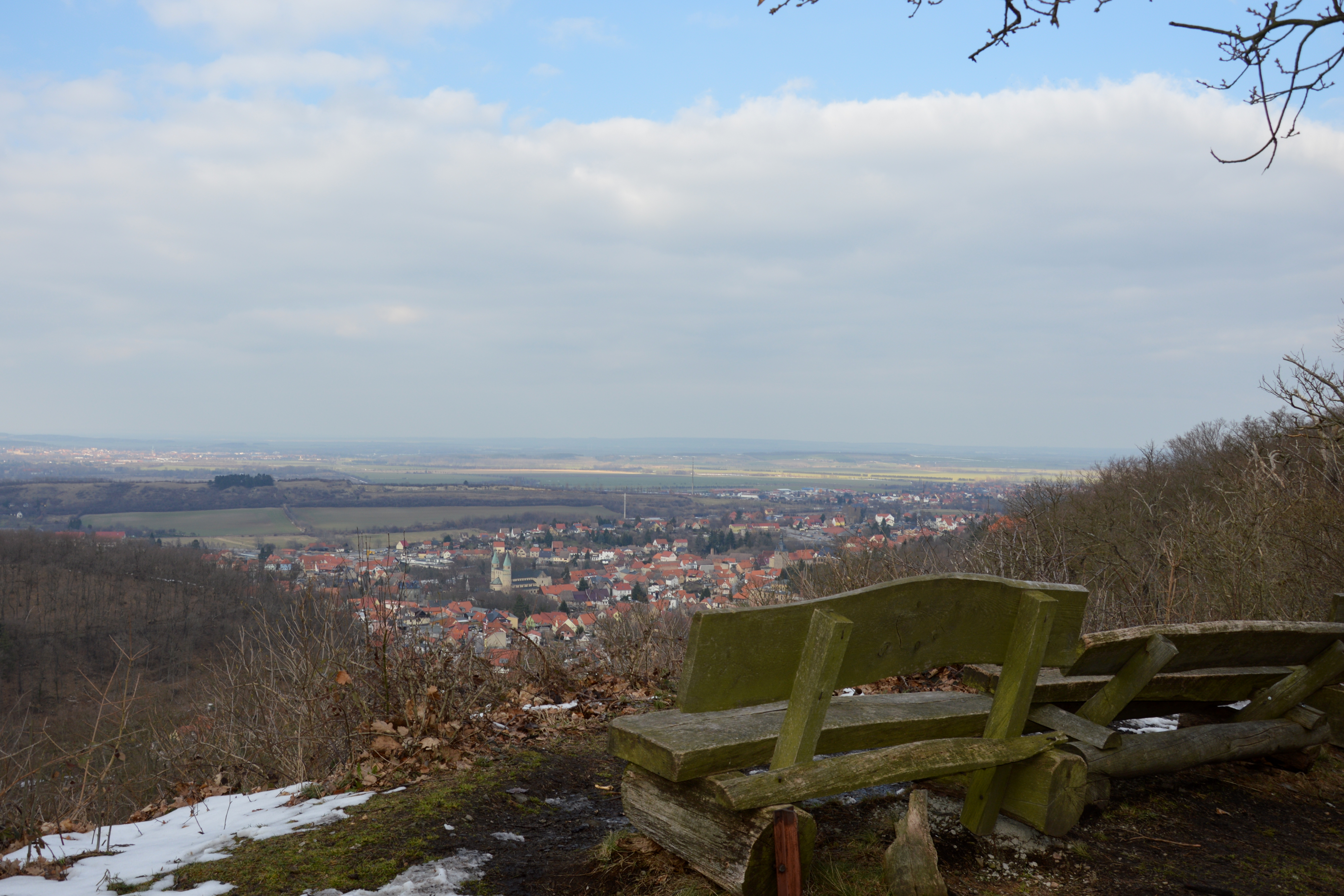 Försterblick Gernrode 2018